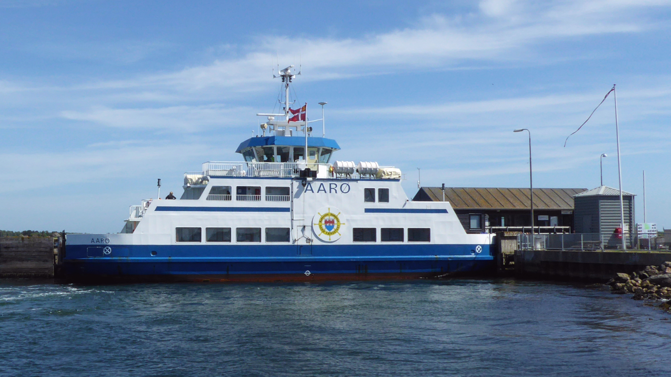 "AARØ færge" in Årøsund havn - Sønderjylland - Syddanmark - Årø-Fähre im Hafen von Årøsund, Jütland Dänemark - Foto 2018 Wolfgang Pehlemann P1210707